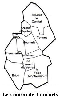 Le canton de Fournels Image personnelle